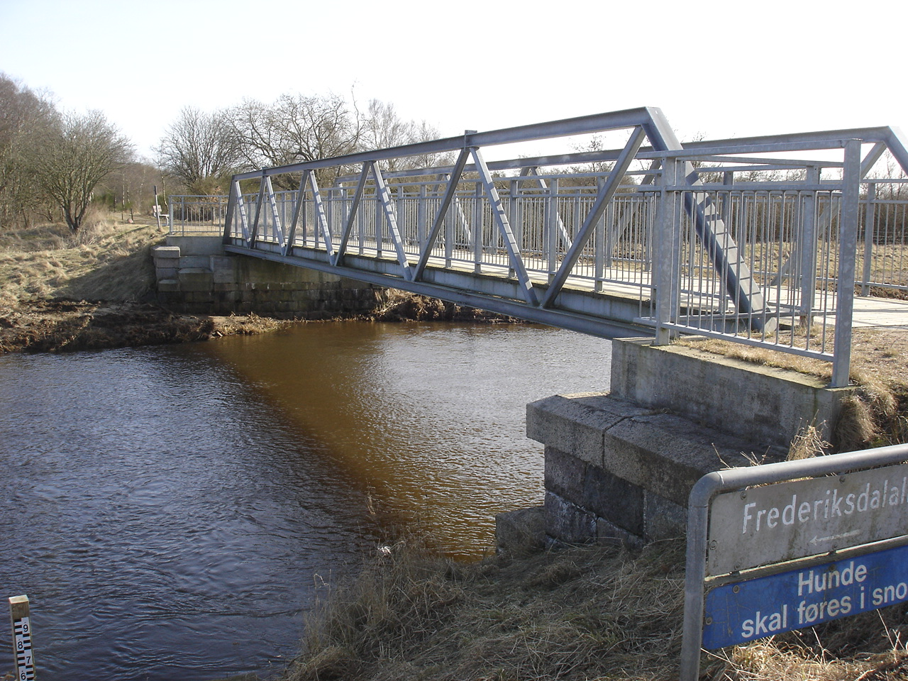 Nyere bro hvor det gamle banetracé S om Skive krydser Karup Å